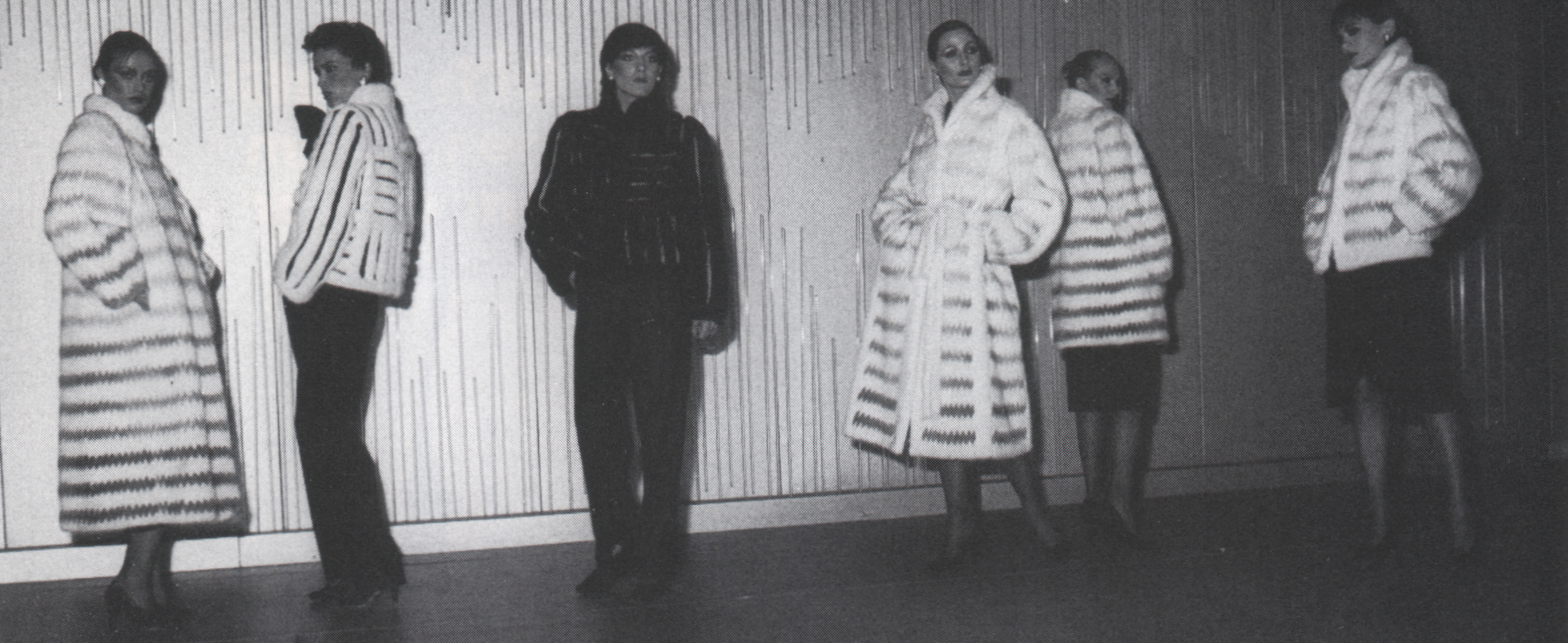 Emba Premiere 1980 anlässlich der Internationale Pelzmesse Frankfurt am Main, Frühjahr 1980 im Hotel Frankfurter Hof. Choreographie Liliana Simonetta und Simona Cagoni. Dekoration Dada Scaligeri. Nerzkollektion der Firma Birger Christensen